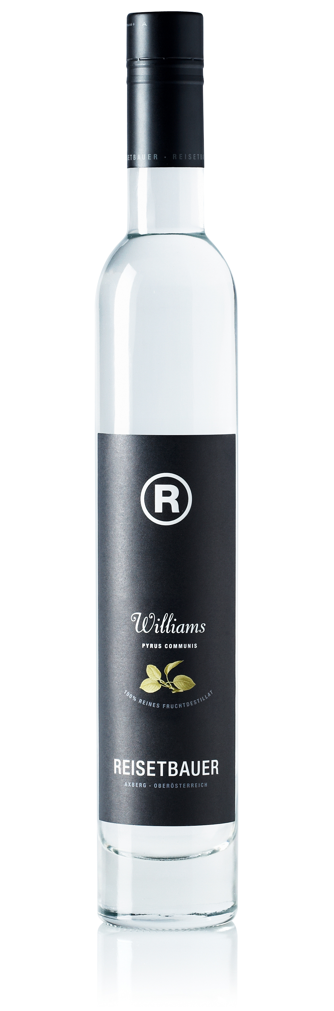 Reisetbauer Edelbrand Williams